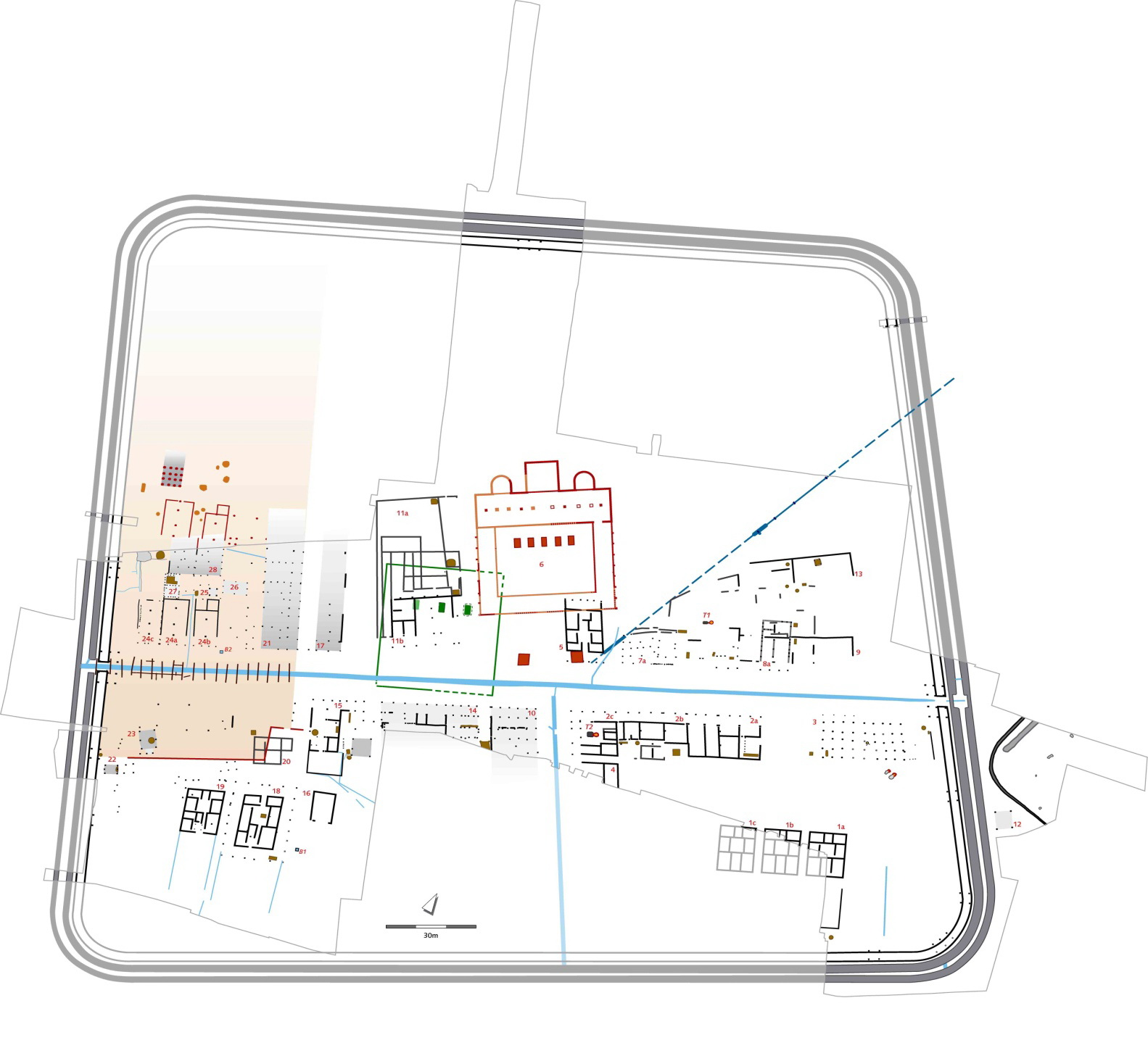 Gesamtplan Grabung „Römisches Forum Waldgirmes“ – Stand 2009 Legende Plan 1 a - 1 c, 5, 18 u. 19: Wohnhäuser 2 a - 2 c, 8 a u. 8 b, 10, 11 a u. b, 14, 15, 17: Wohn- und Wirtschaftsbauten mit zur Straße offenen Räumen 3, 12, 25, 29, 32: Speicherbauten mit erhöhtem Boden 24 a - c, 30 - 31: Hallenbauten 20 u. 21: Mannschaftskaserne mit abgesetztem Kopfbau 9 u. 13 offene Schuppen 22, 23, 26, 33: Bauten ungeklärter Funktion und Zeitstellung 16: Hallenbau (sakrale Funktion?) B1 u. B2: Brunnen 1 und 2 T1 u. T2: Töpferofen 1 und 2